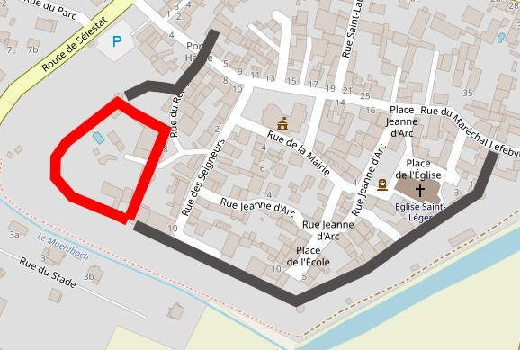 Lage der Burg Guémar (rot) und Verlauf der Stadtmauer This map may be incomplete, and may contain errors. Don't rely solely on it for navigation.